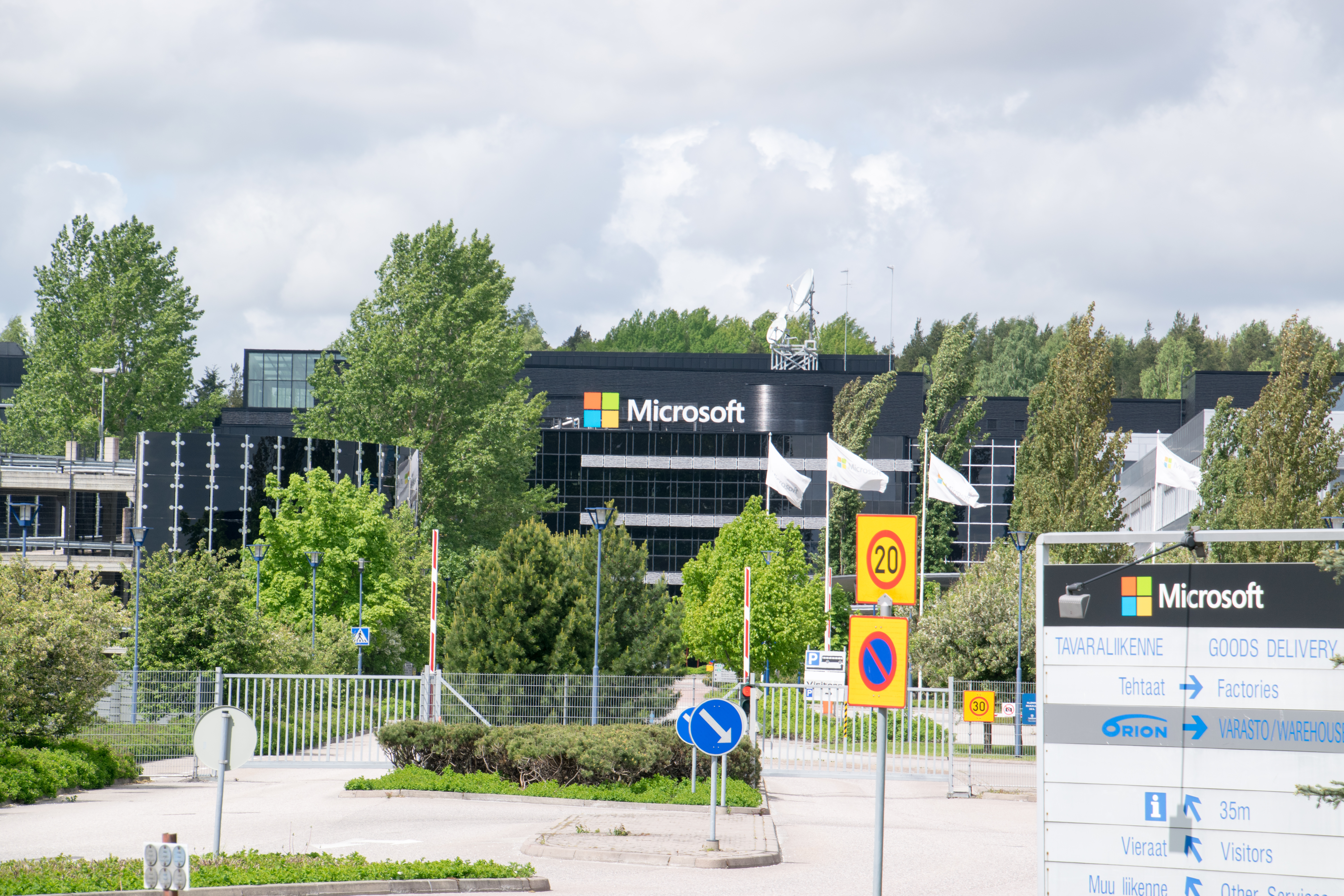 Microsoft tuotekehitysyksikkö